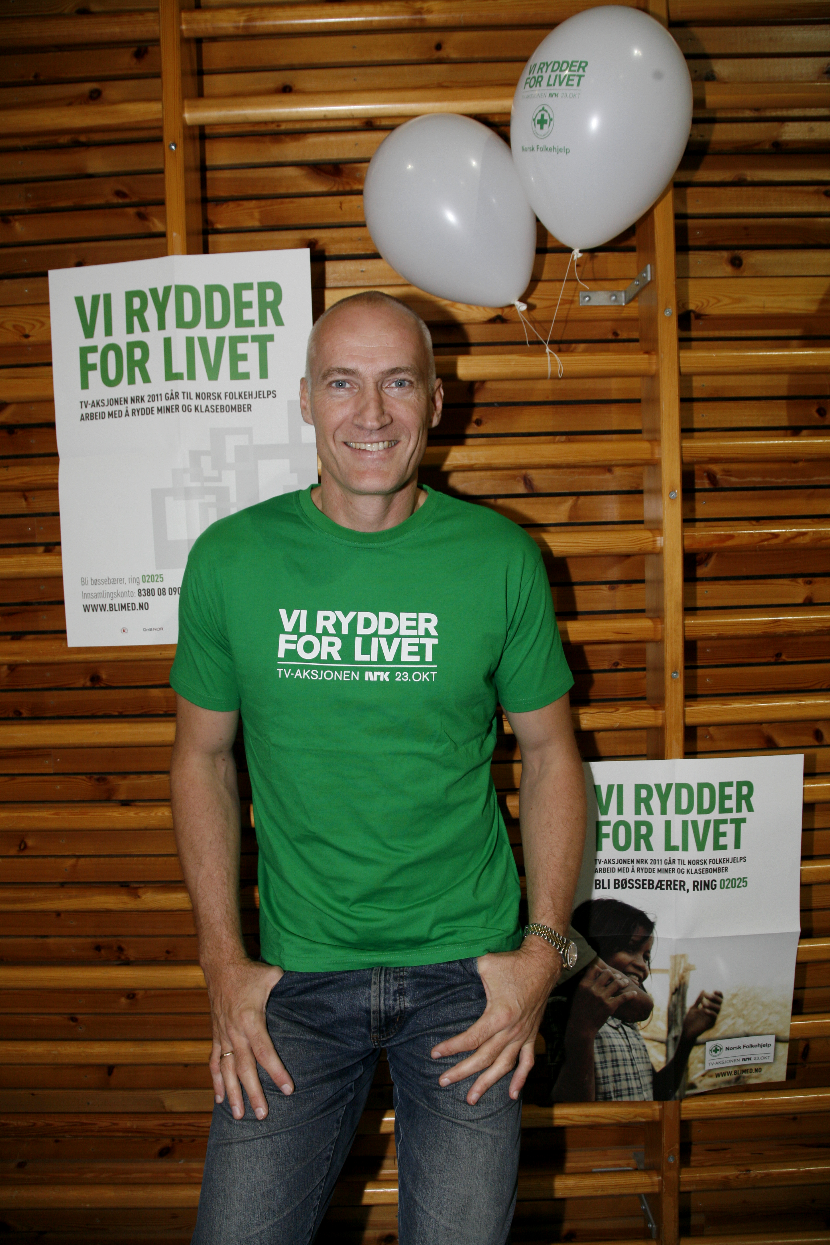 Foto: Eivor Eriksen